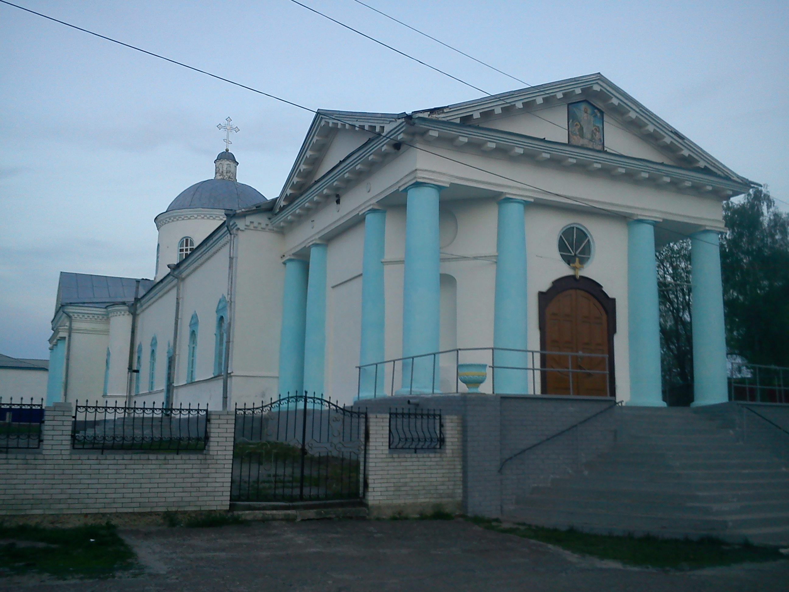 фото Воскресенської церкви в м. Ічня